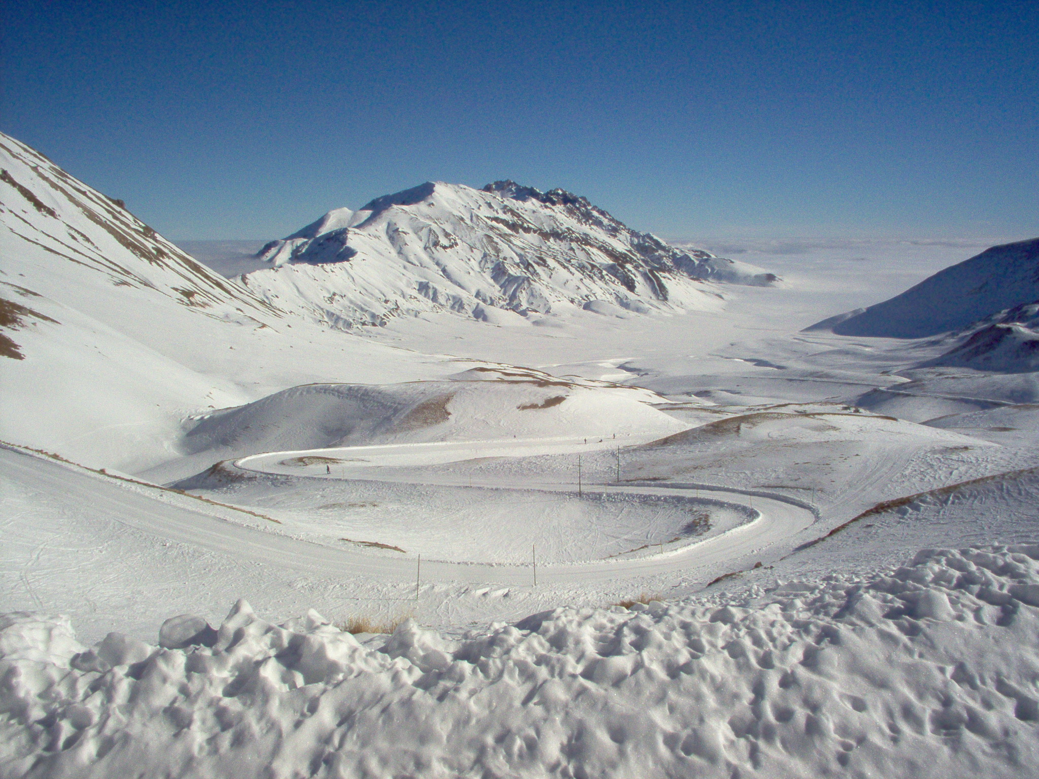 L'ho scattata personalmente per wikipedia